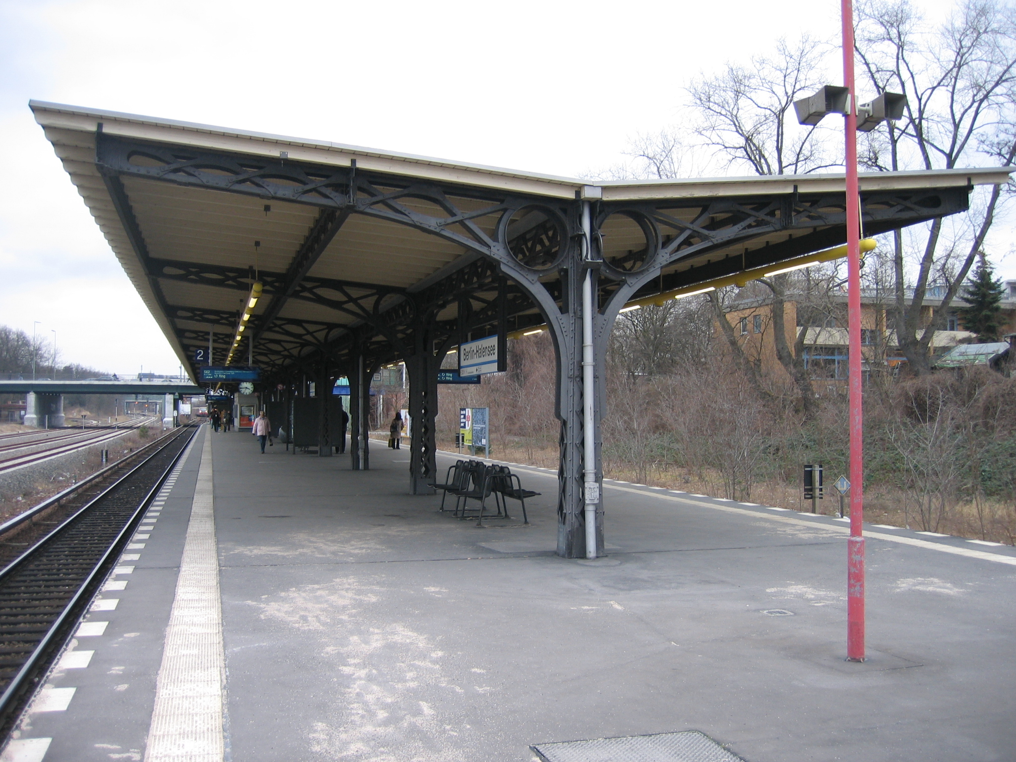 Der S-Bahnhof Halensee in Berlin